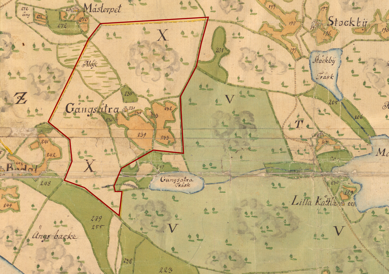 Gångsätra gårds fastighetsgränser 1774, motsvarande en total areal på 48 hektar.